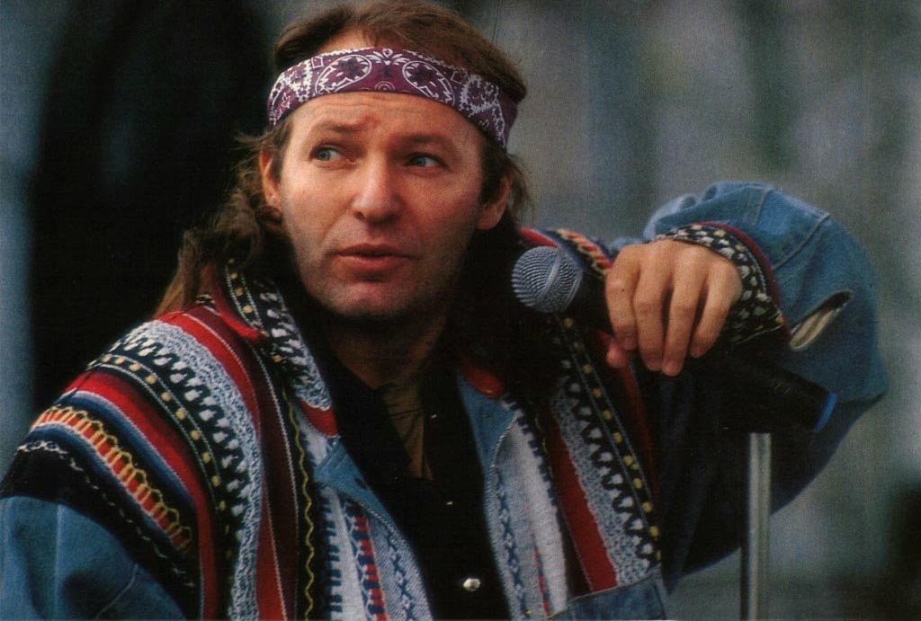 Vasco foto fine anni 80'